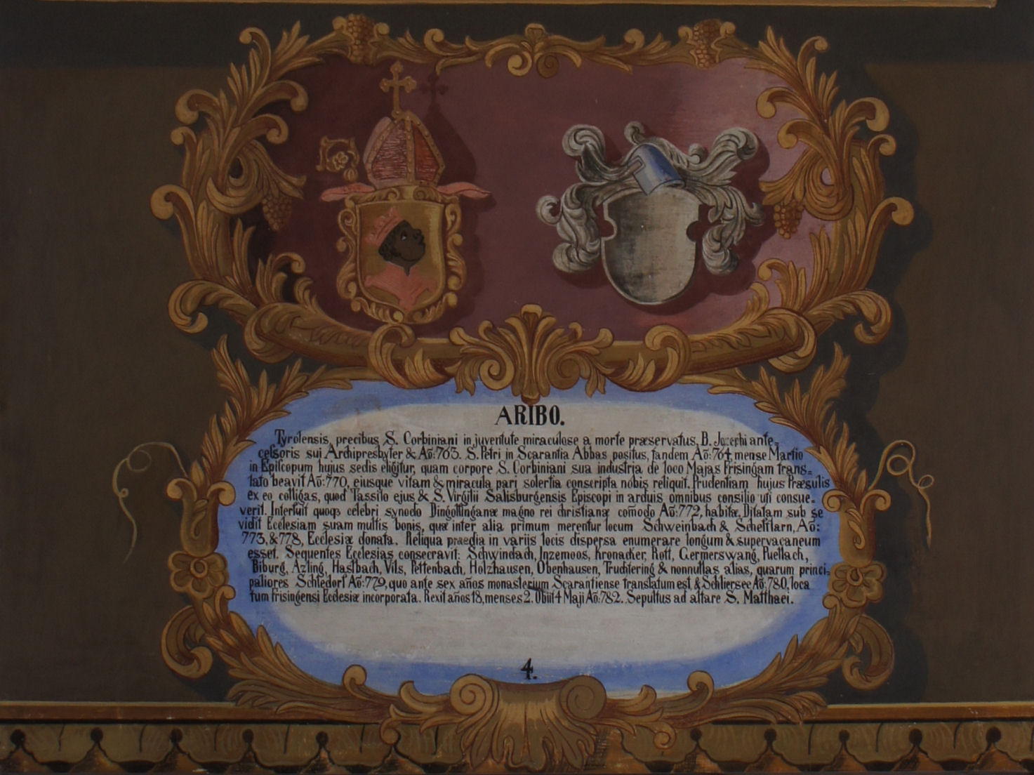 Wappentafel von Arbeo, Bischof von Freising, im Fürstengang zwischen Fürstbischöflicher Residenz und Freisinger Dom. Links das geistliche, rechts das persönliche Wappen, darunter ein lateinischer Text mit kurzer Biographie.